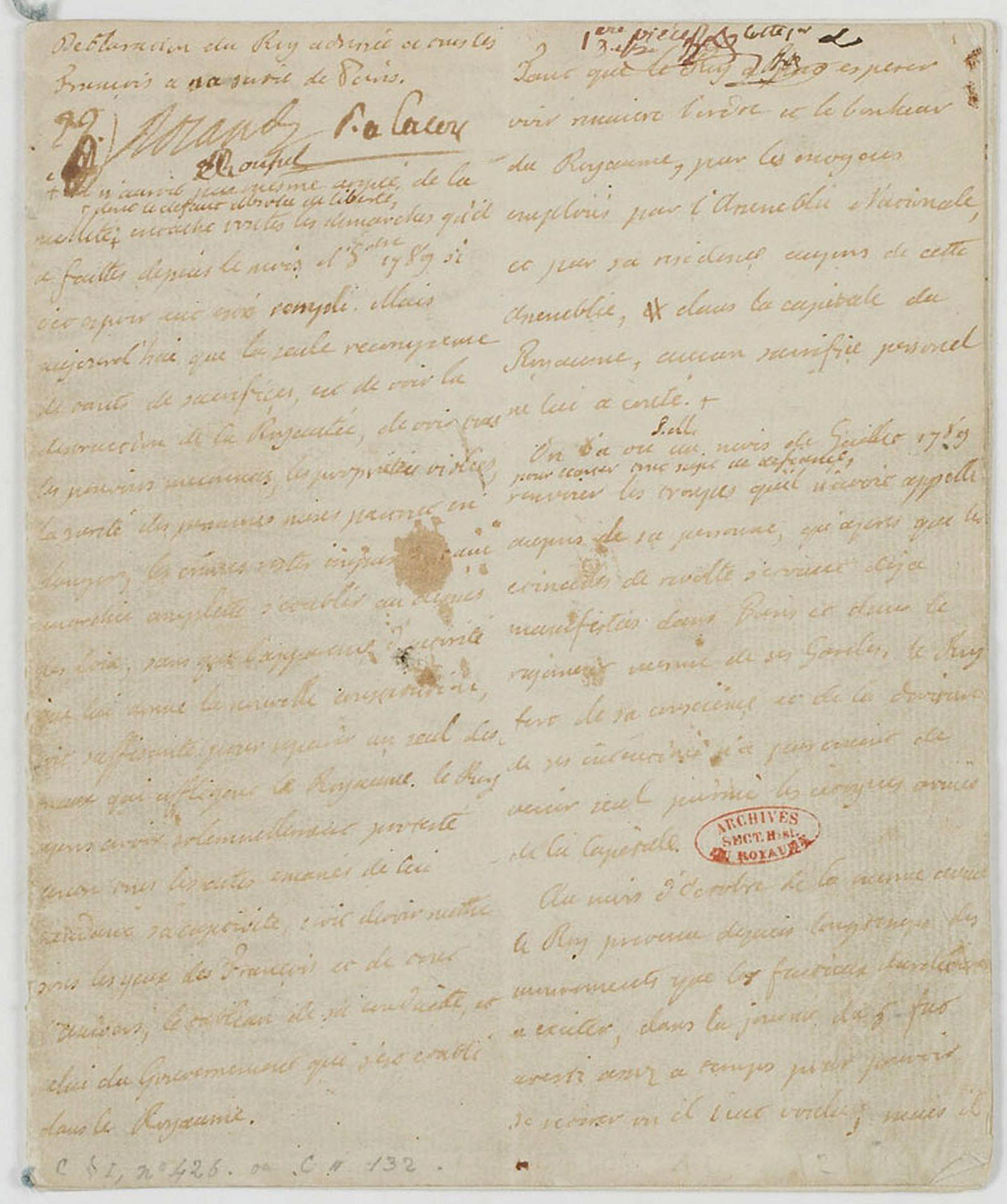 Cette déclaration retrace les principaux événements du règne de Louis XVI depuis le 14 juillet 1789. Elle fut d'abord remise à l'Assemblée puis communiquée à la Commission des vingt-et-un le 14 décembre 1792, en exécution du décret du 9 du même mois.